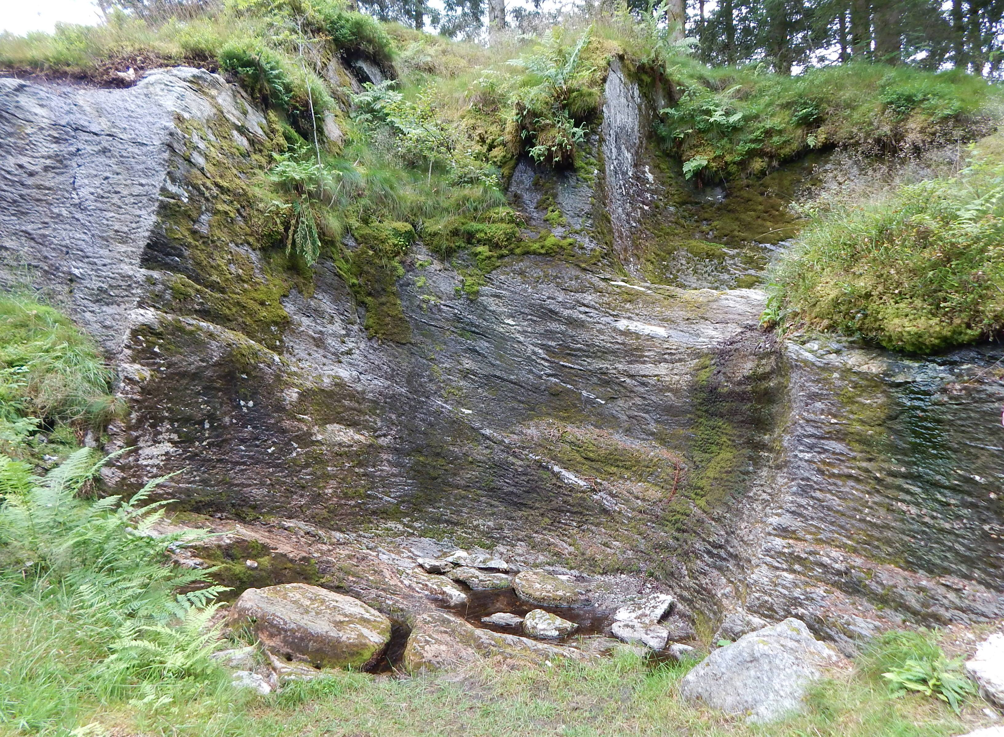 Kvernsteinsparken i Hyllestad